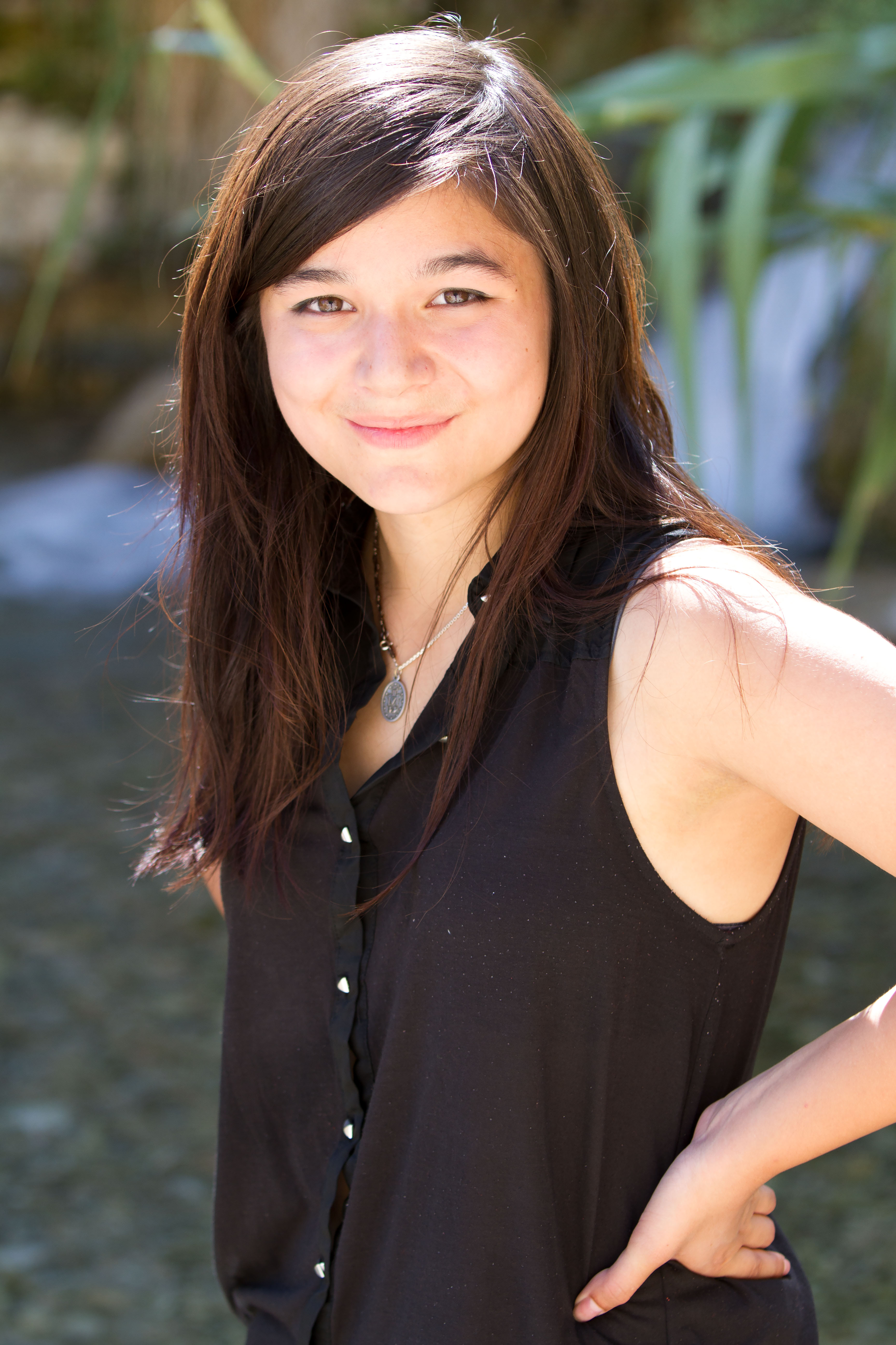 Regisseurin Samantha Günther